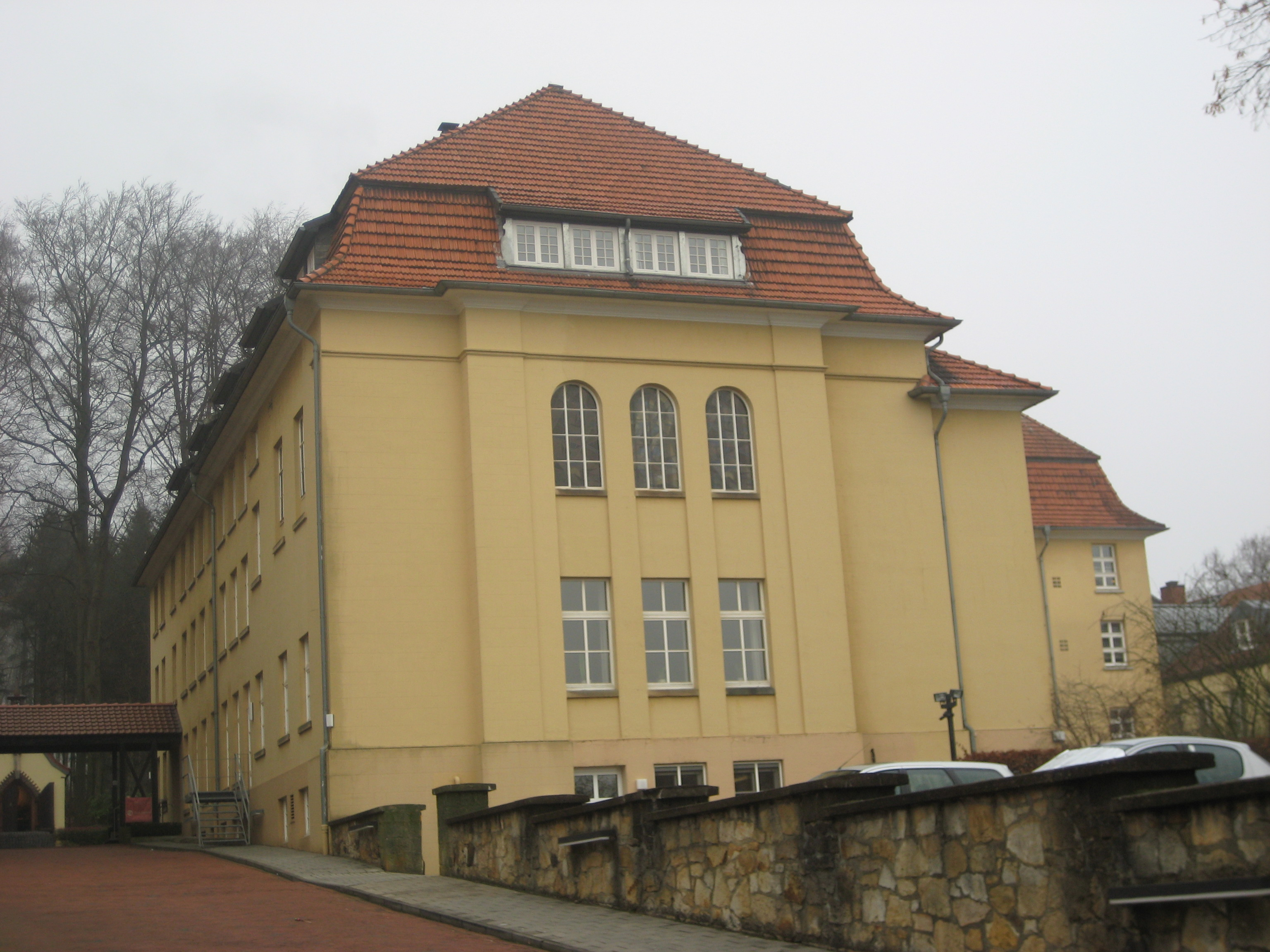 Haus Ohrbeck des Klosters Ohrbeck in Georgsmarienhütte-Holzhausen, 1926 gebaut